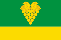 Флаг Верхнекубанского сельского поселения, Краснодарский край, Россия.